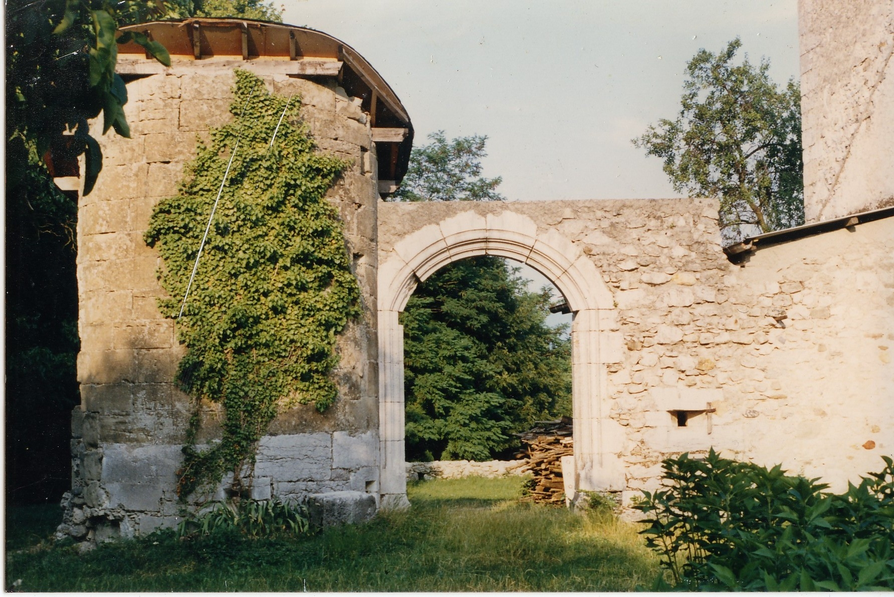 entrée du château de Montcharvin